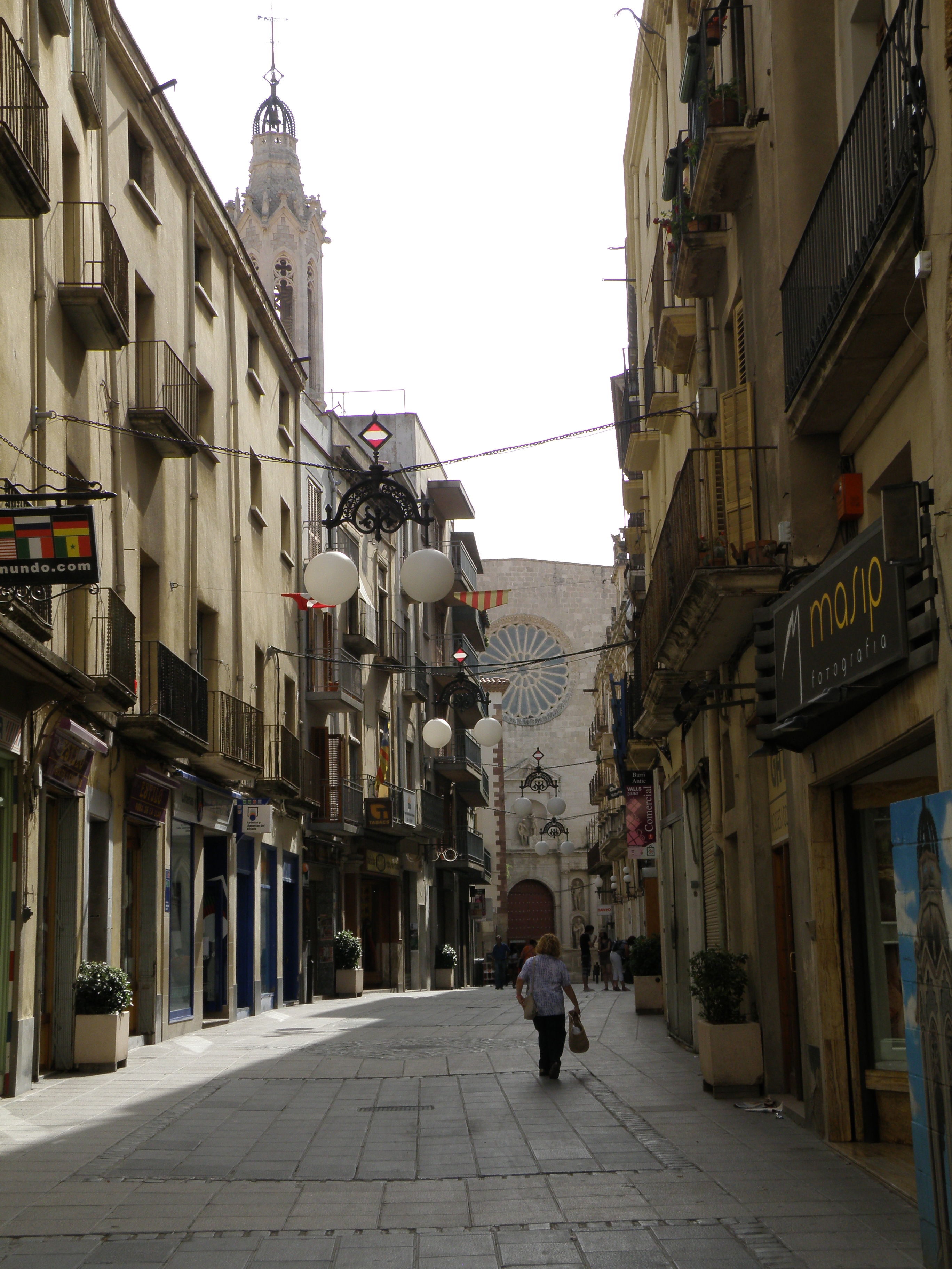 Carrer de la Cort, Valls, Alt Camp.